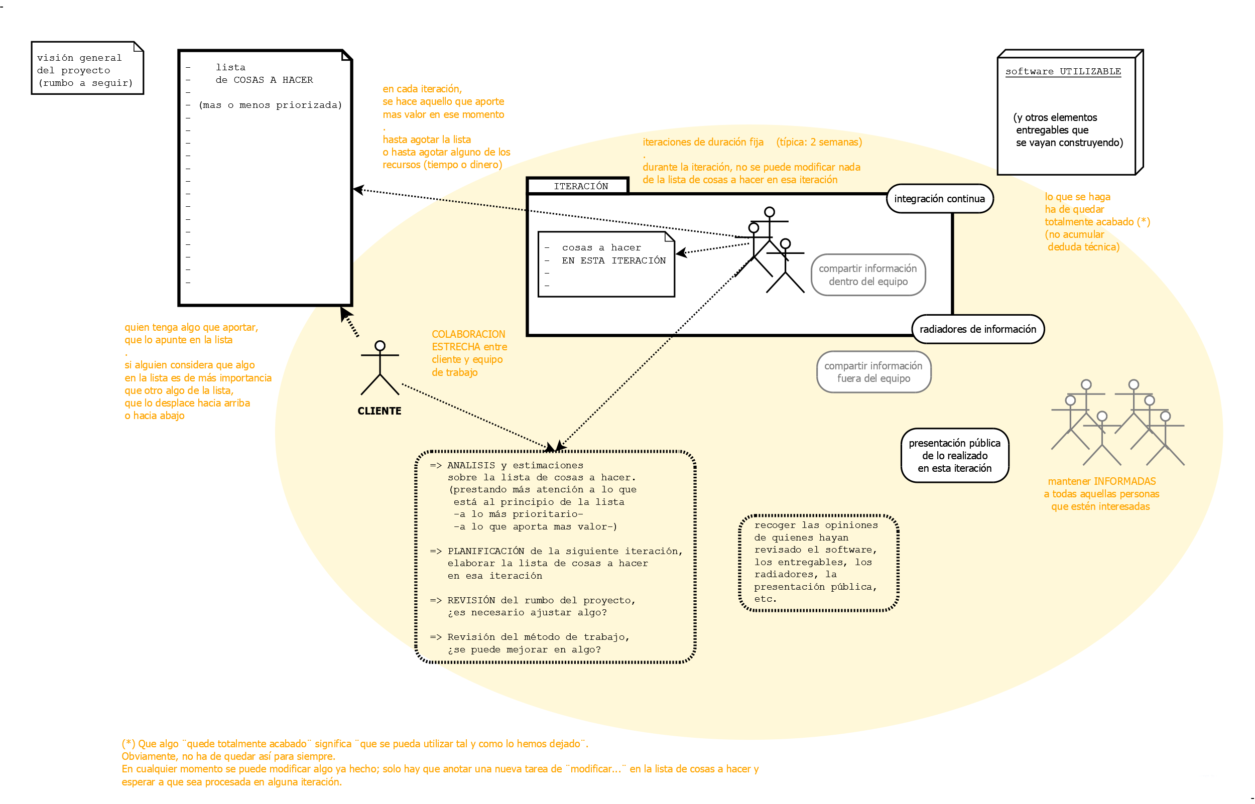 Esquema general del proceso de desarrollo de software siguiendo una metodologia de trabajo ágil.